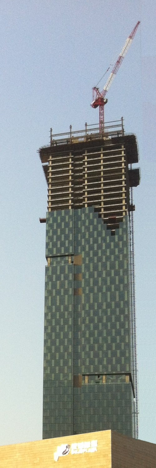 Deji Plaza, Nanjing (May 2012)